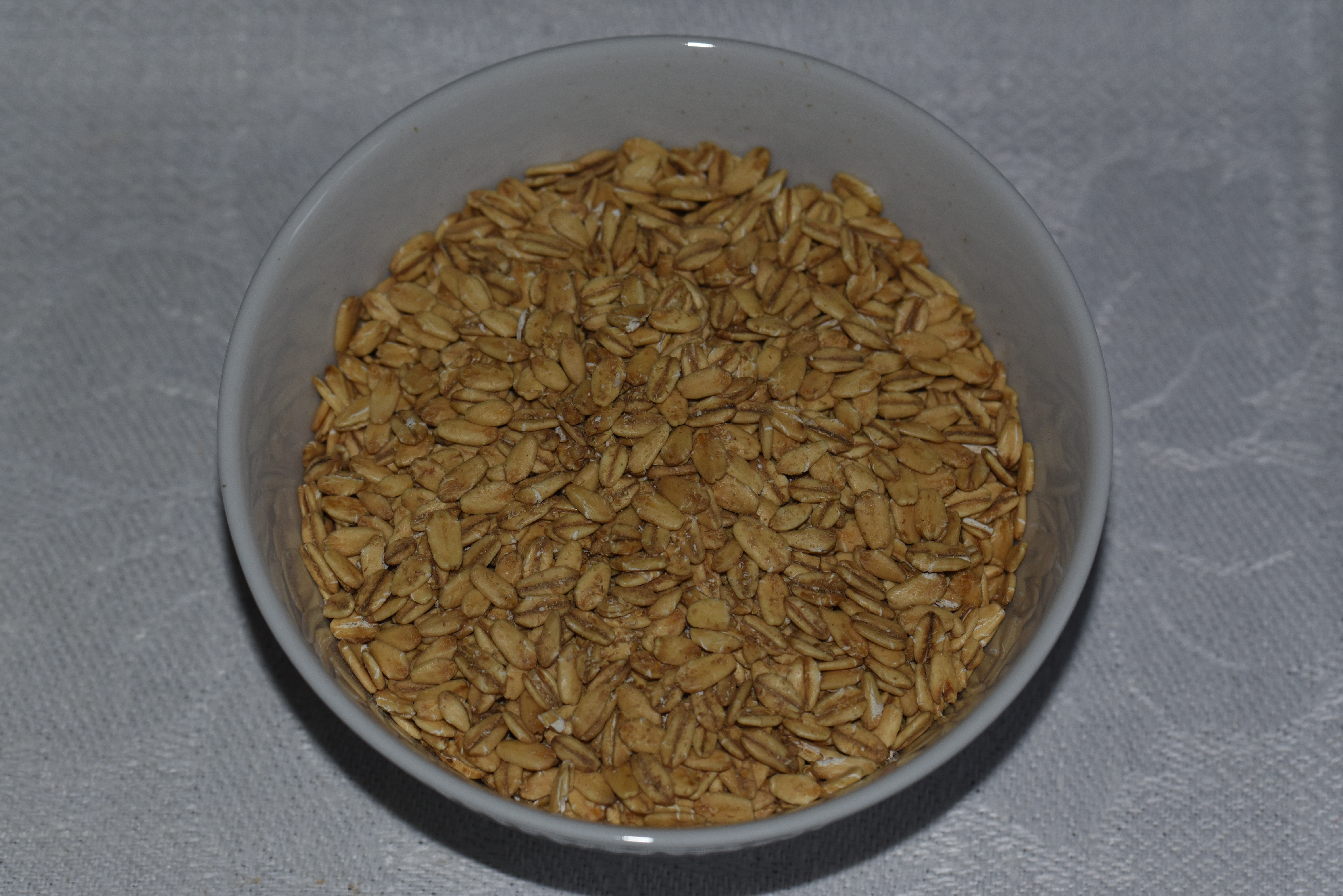 Okokt mathavre i skål. Mathavre är en spannmålsprodukt av havre som kokas och kan användas till maträtter.